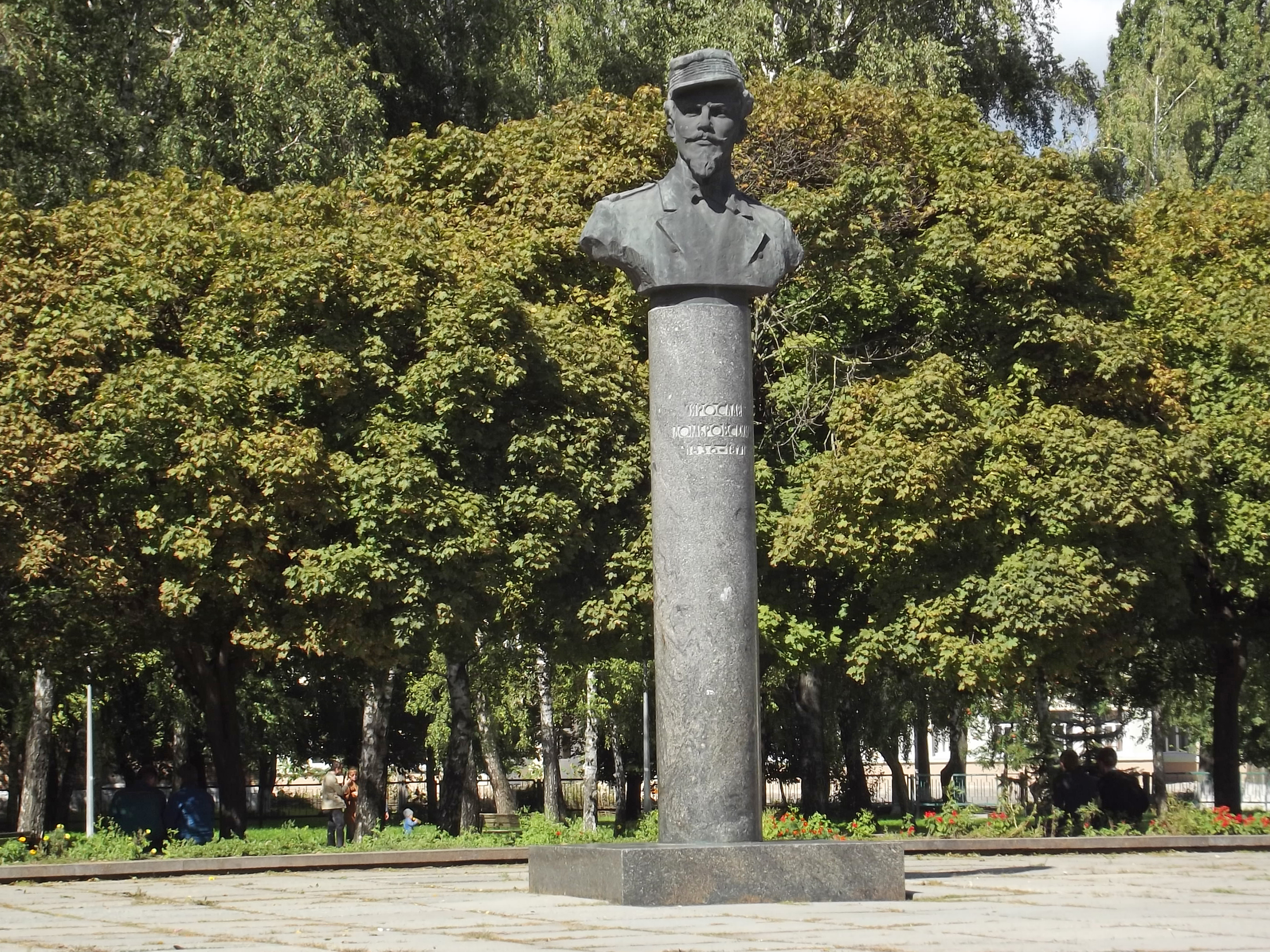 Памятник Ярославу Домбровскому